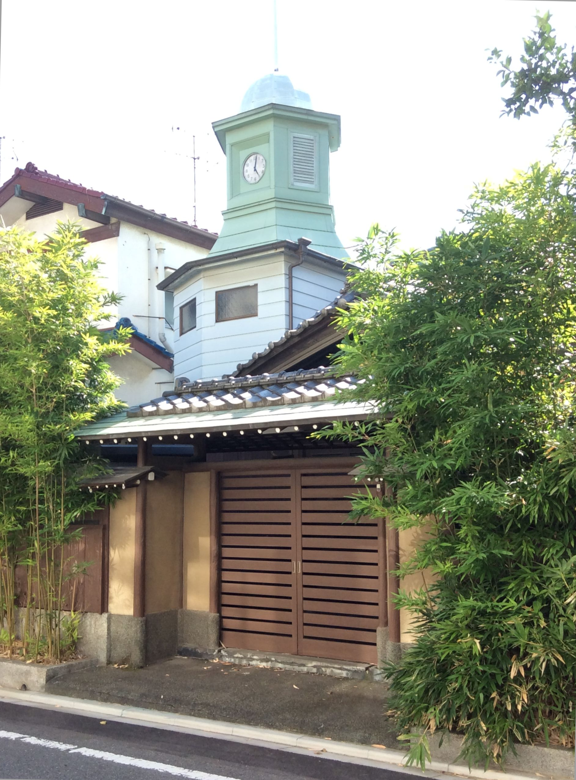 南馬込 河原家住宅